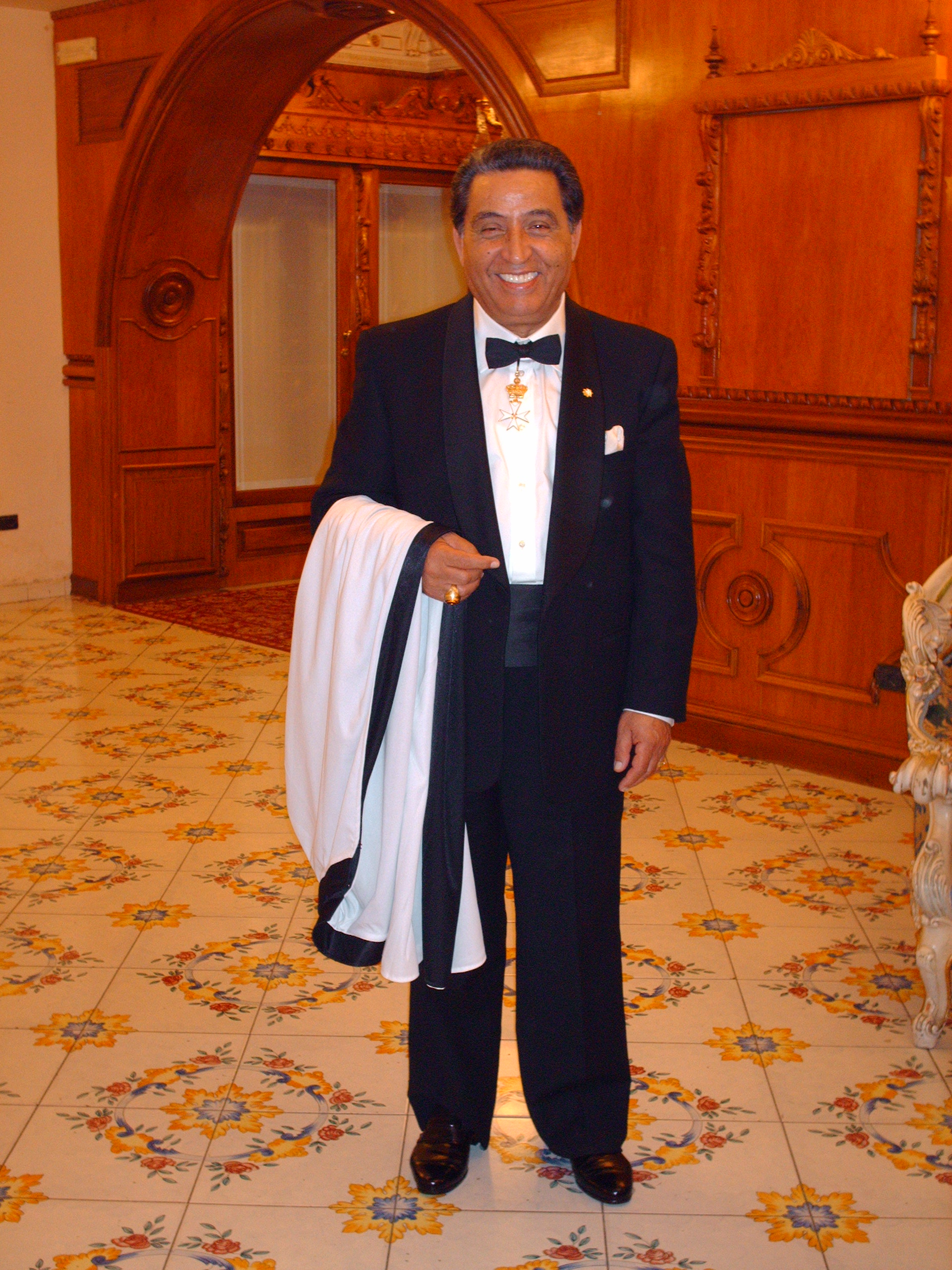 La foto qui caricata è stata fatta da me. Mario Trevi mi ha dato il permesso di poterla caricare in rete. La foto ritrae Mario Trevi il giorno della nomina a Cavaliere dell'ordine di Malta